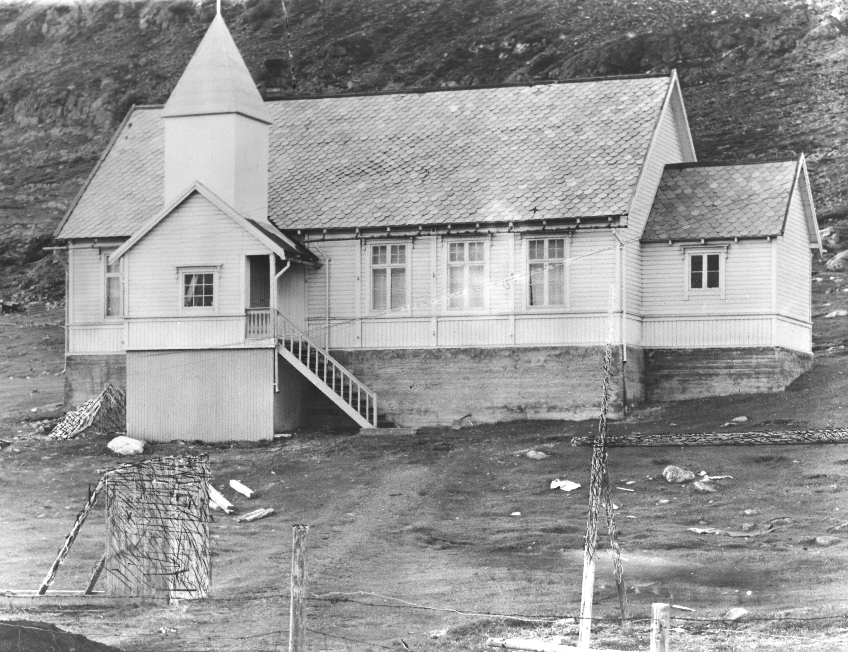 Kongsfjord fiskerhjem og bedehuskapell fotografert i 1929. Fra Finnmark fylkesbiblioteks samling i Digitalt museum.